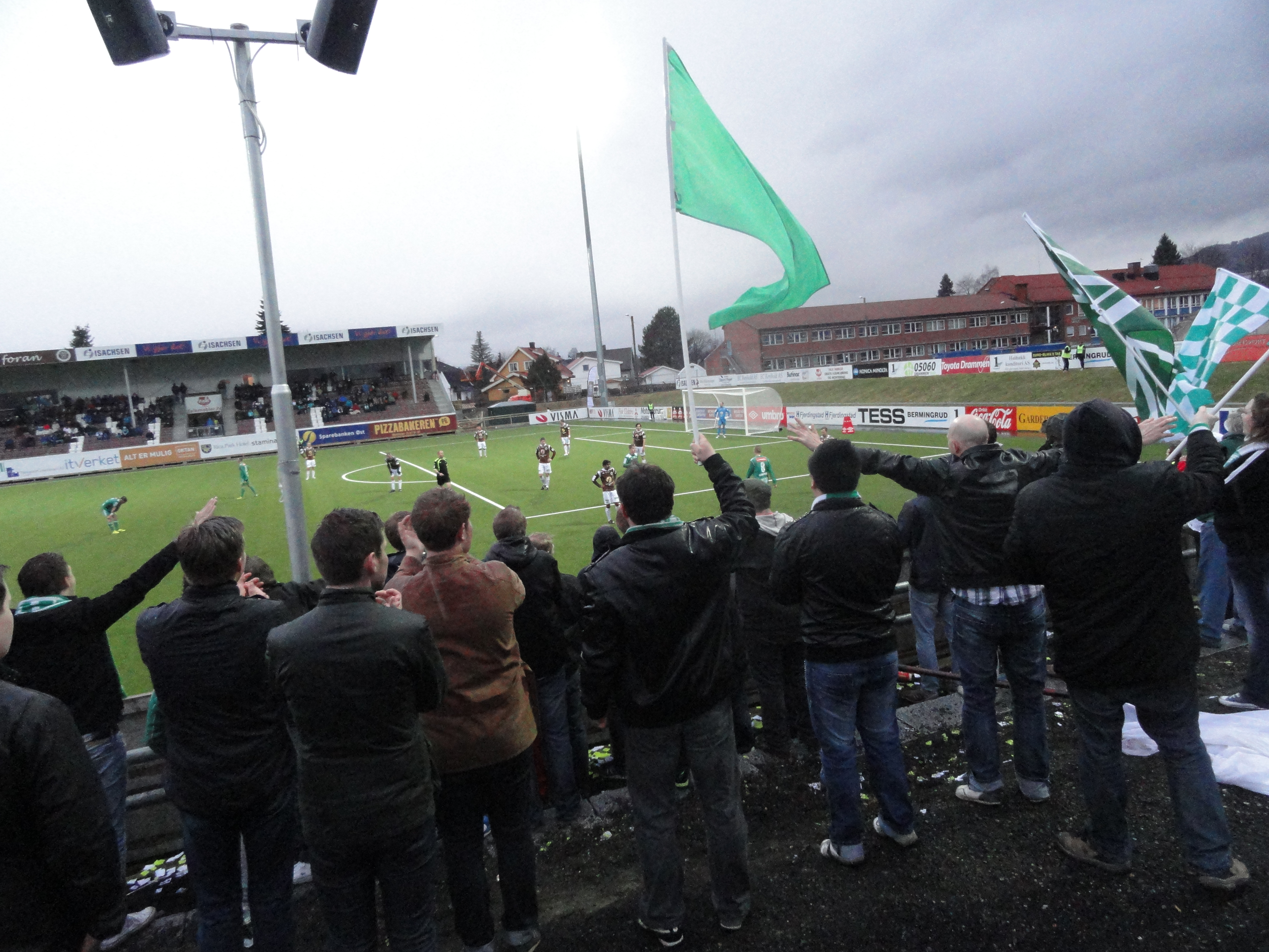 Bilde fra 4. serierunde i Adeccoligaen 2013 mellom Mjøndalen og Hamarkameratene.